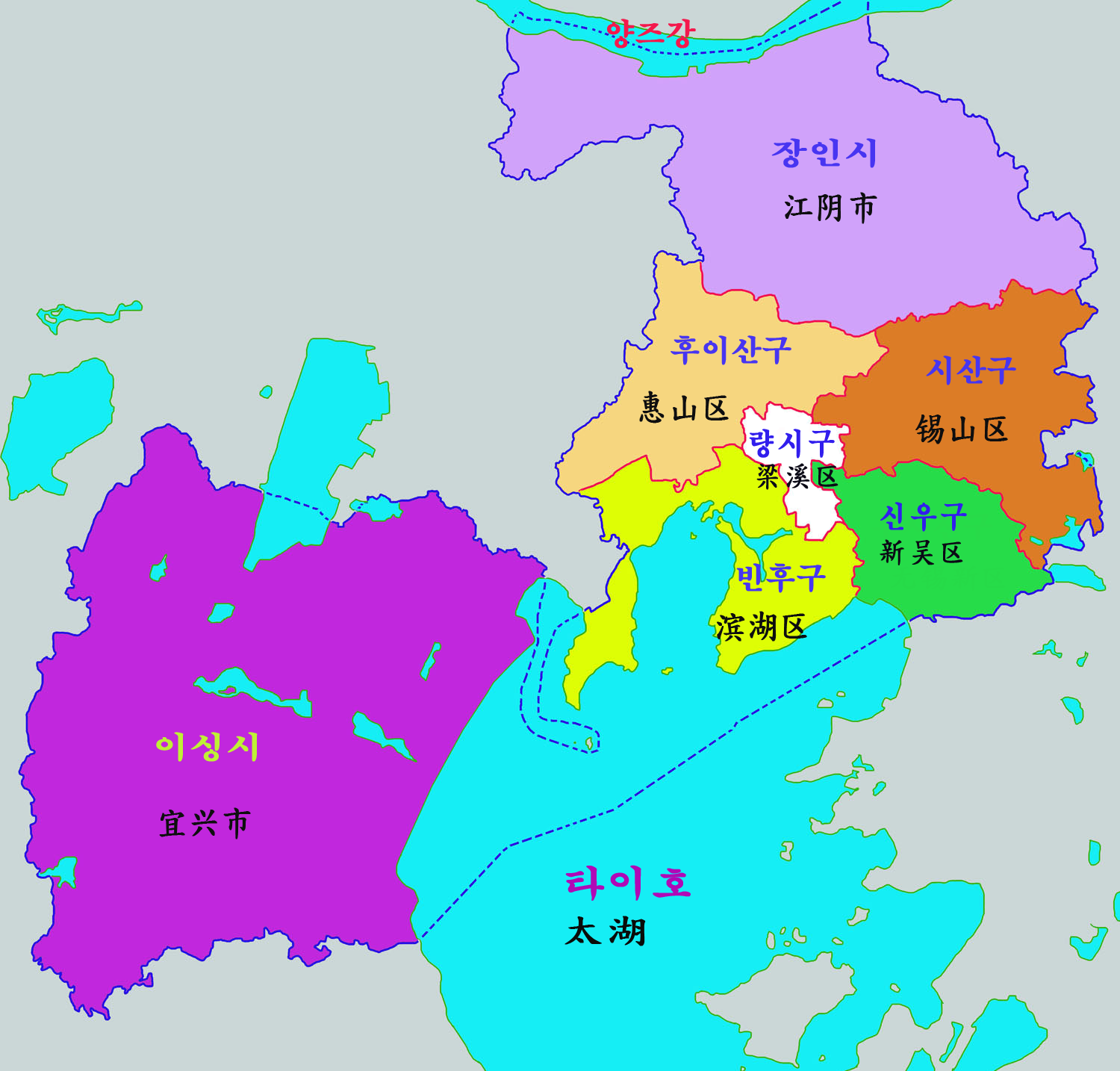 우시시 현급행정구역